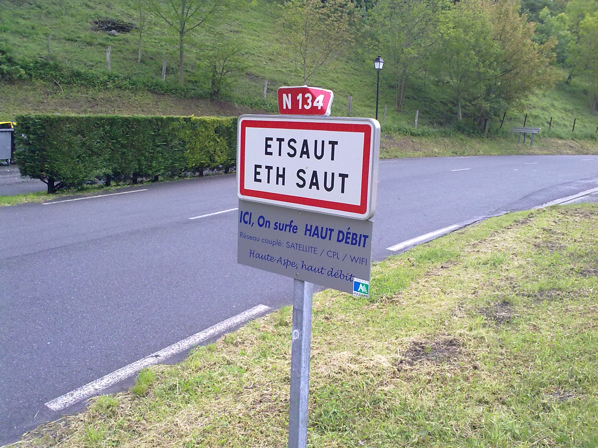 Etsaut, France